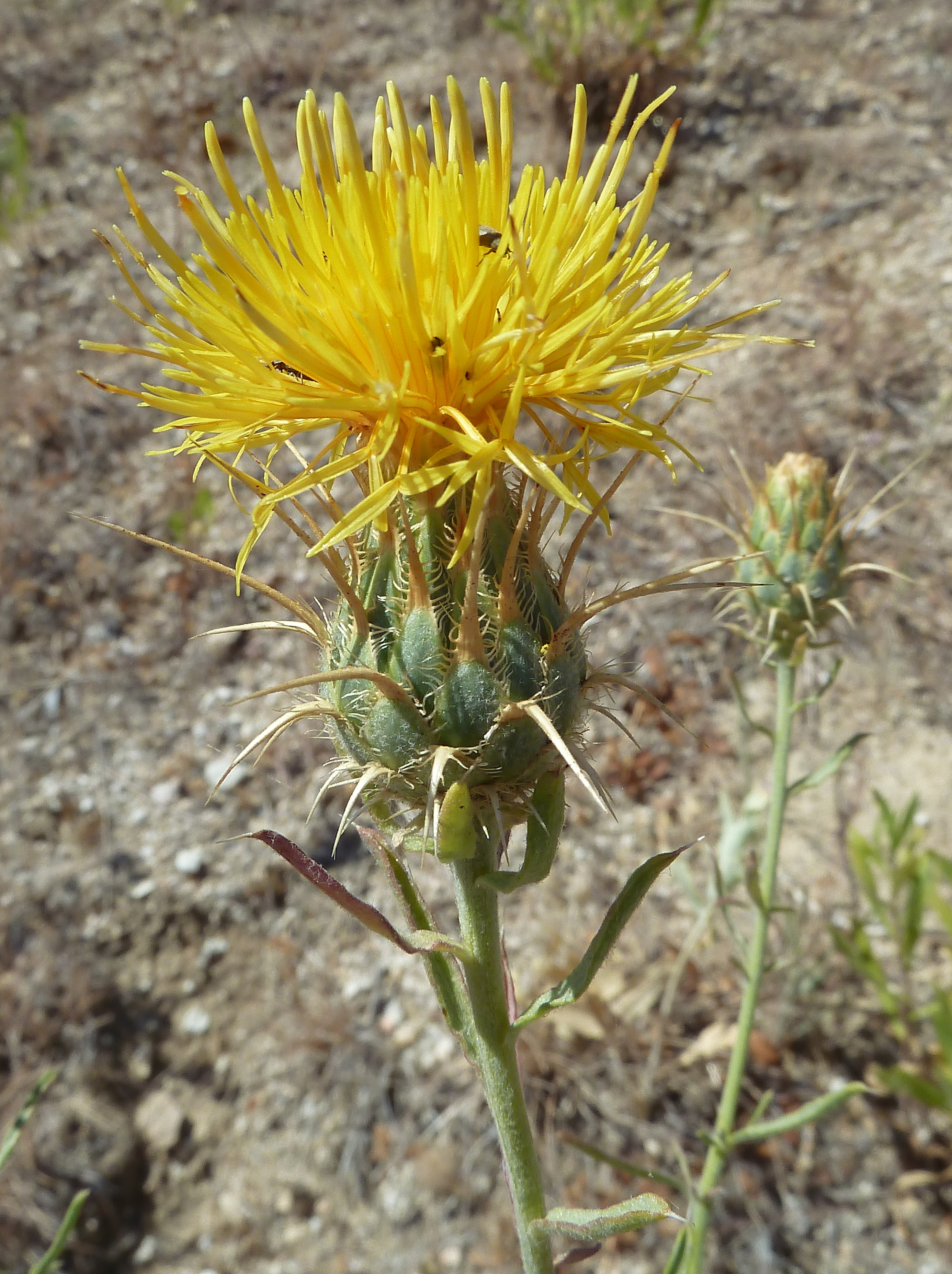 Centaurea ornata (Abrepuños) - Capítulo en antesis. - Avda del Ventero de la Condesa, El Saceral, Madrid capital (España).